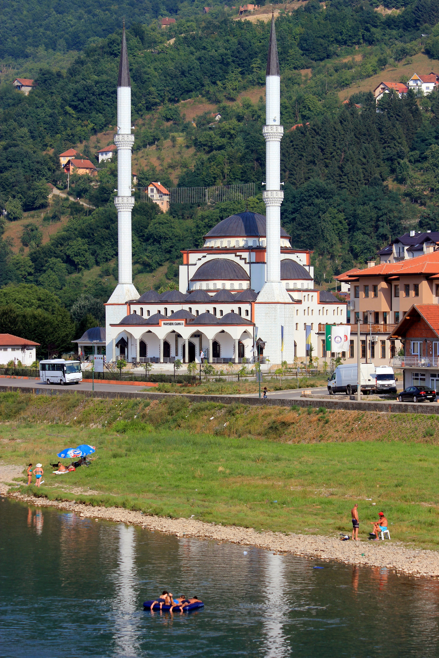 Moschee an der Drina in Goražde, Bosnien und Herzegowina.